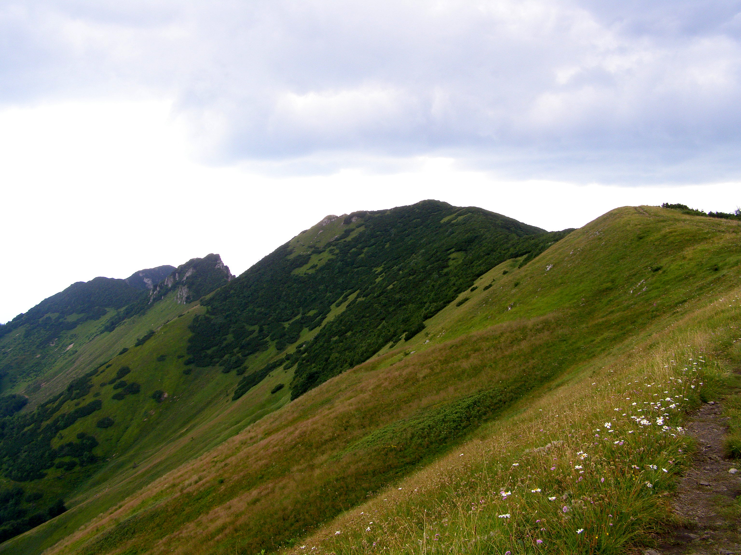 Krivánská Malá Fatra, zprava: Stratenec (1513 m), Biele skaly a zcela vlevo vzadu Suchý (1468 m)